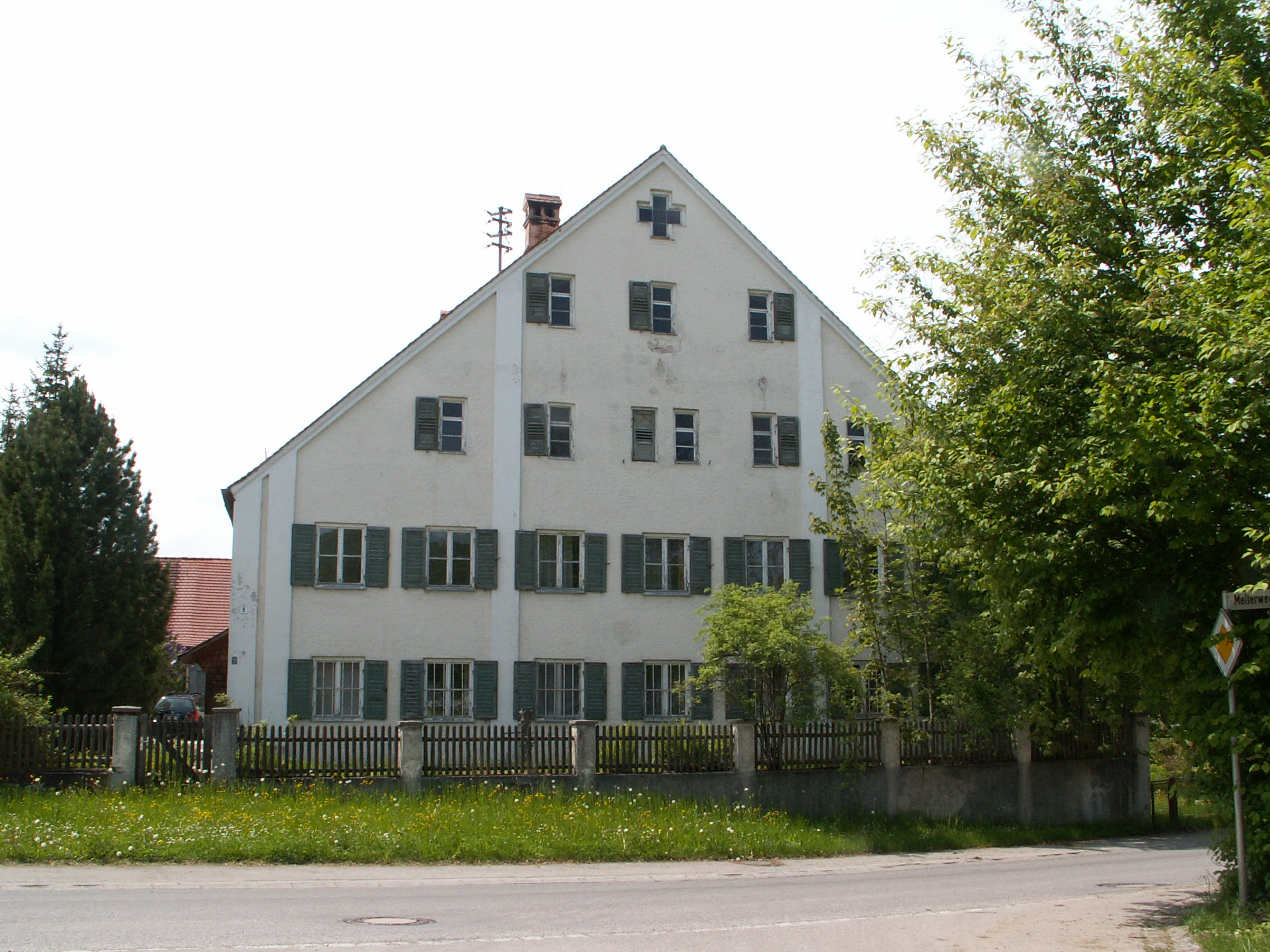 Pfarrhof in Stöttwang